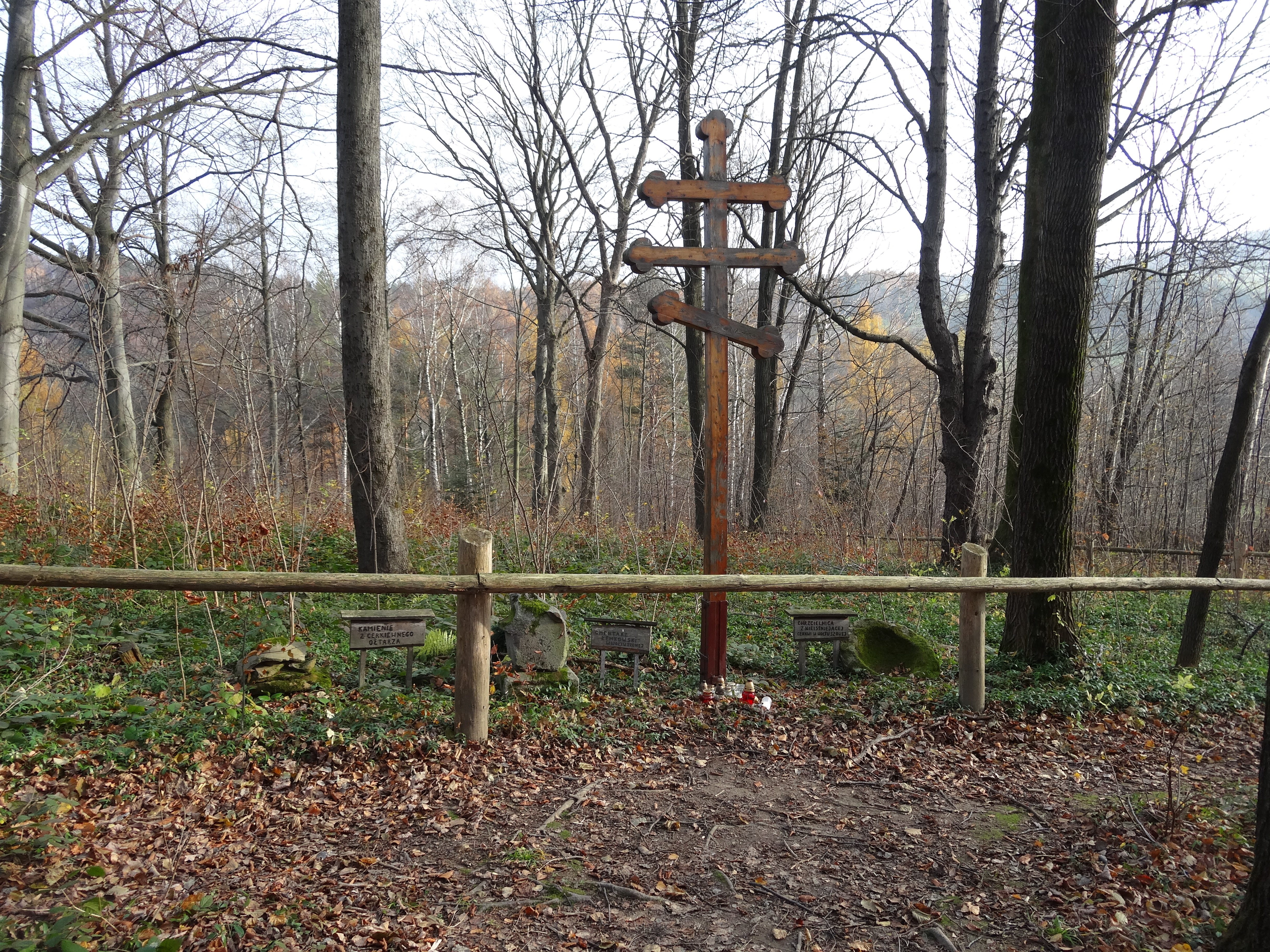 Rymanów-Zdrój Wołtuszowa